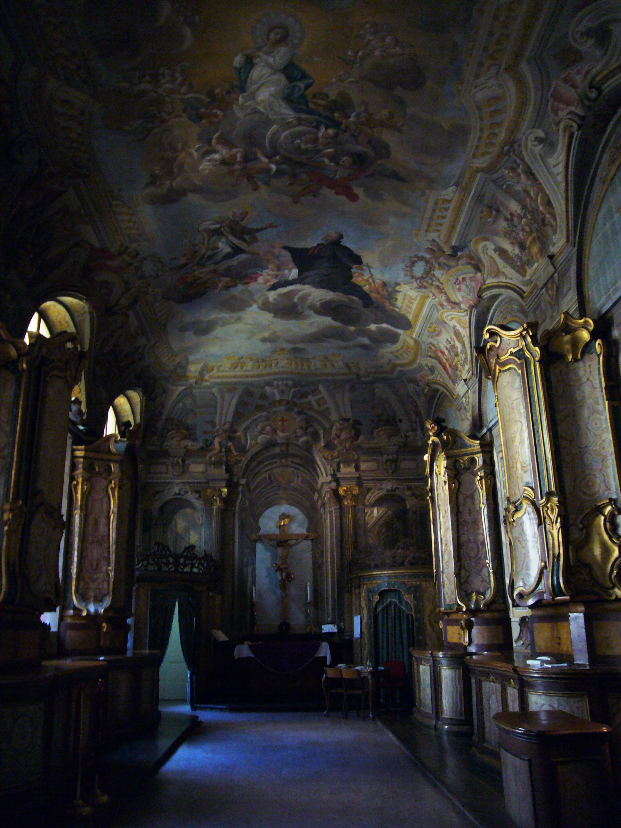 Roma, Santa Maria Maddalena: sagrestia